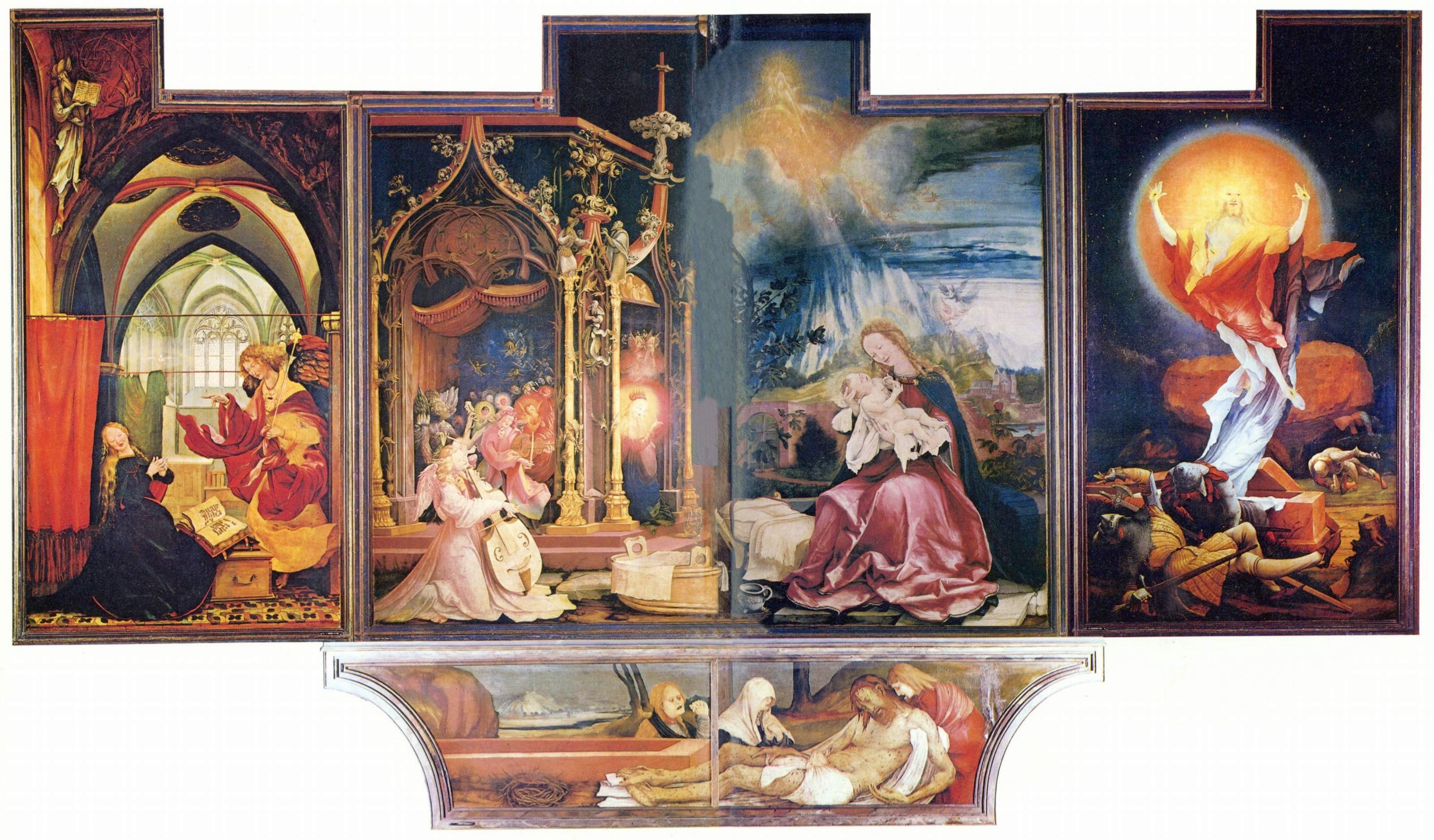 detail